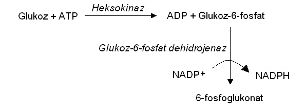 Glukoz-6-fosfat dehidrojenaz kullanılarak yapılan heksokinaz enzimi kenetli ölçümü.